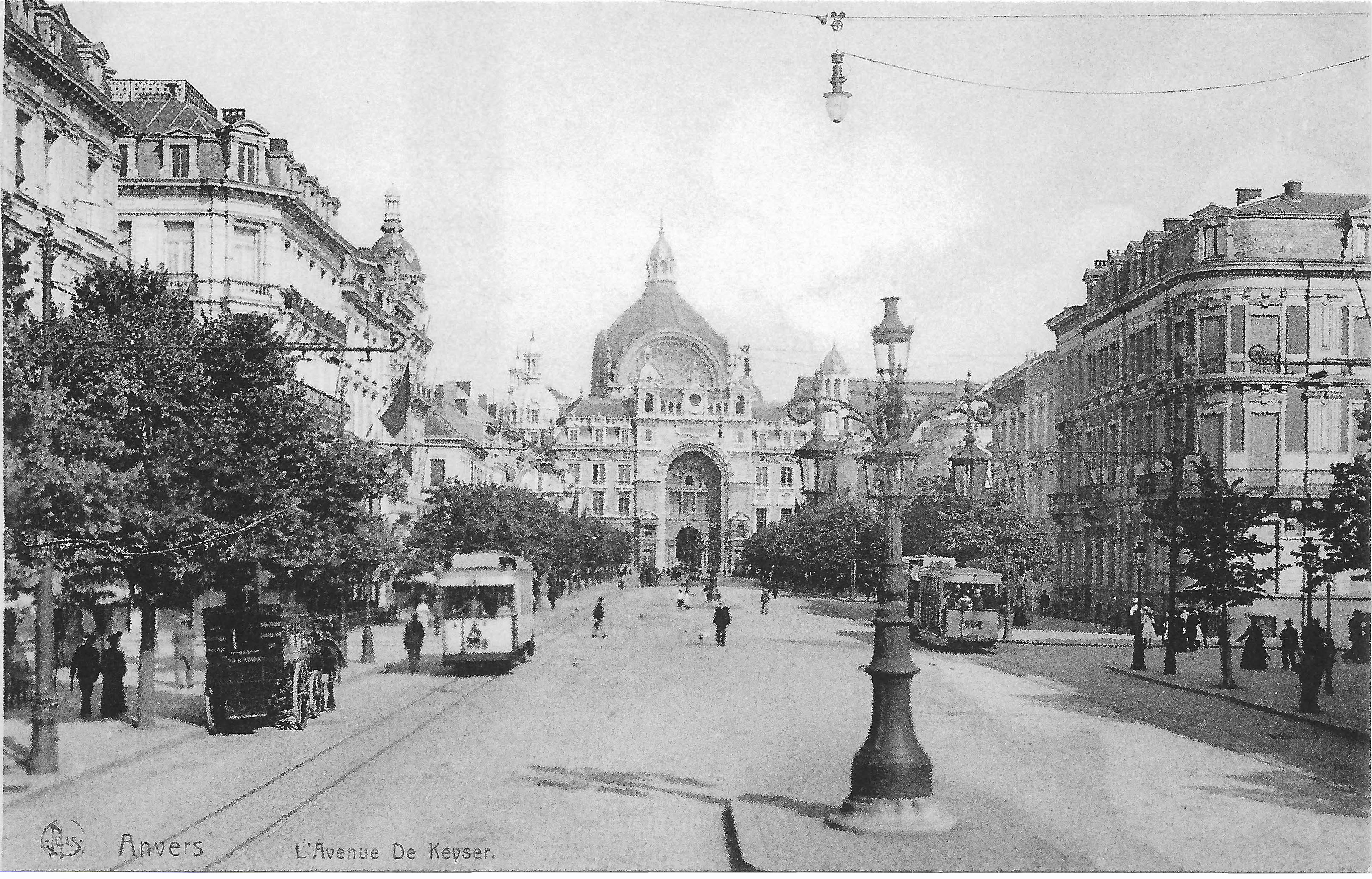 Oude briefkaart de de Keyserlei in Antwerpen